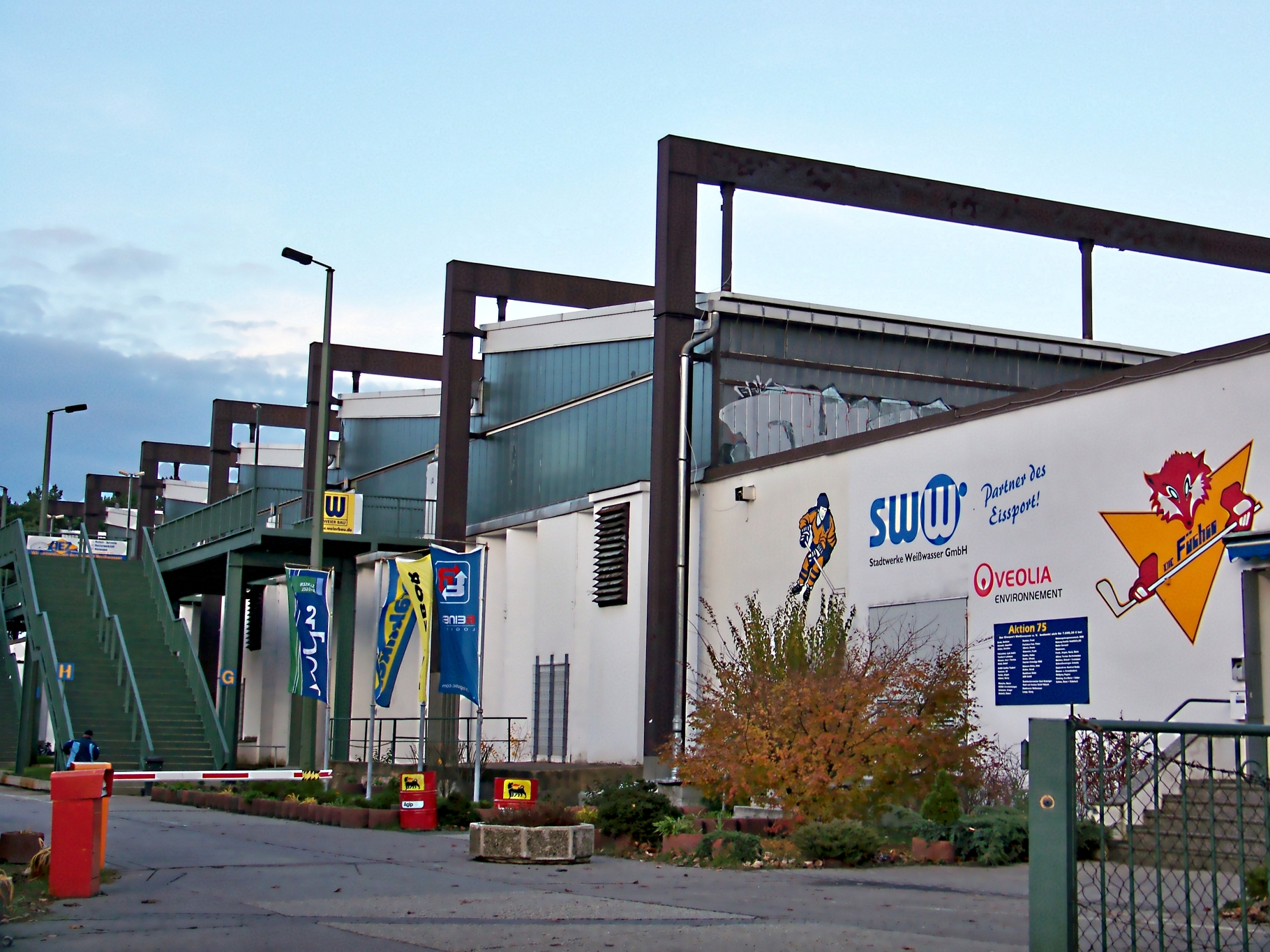 Eisstadion Weißwasser, Heimstadion des EHC Lausitzer Füchse